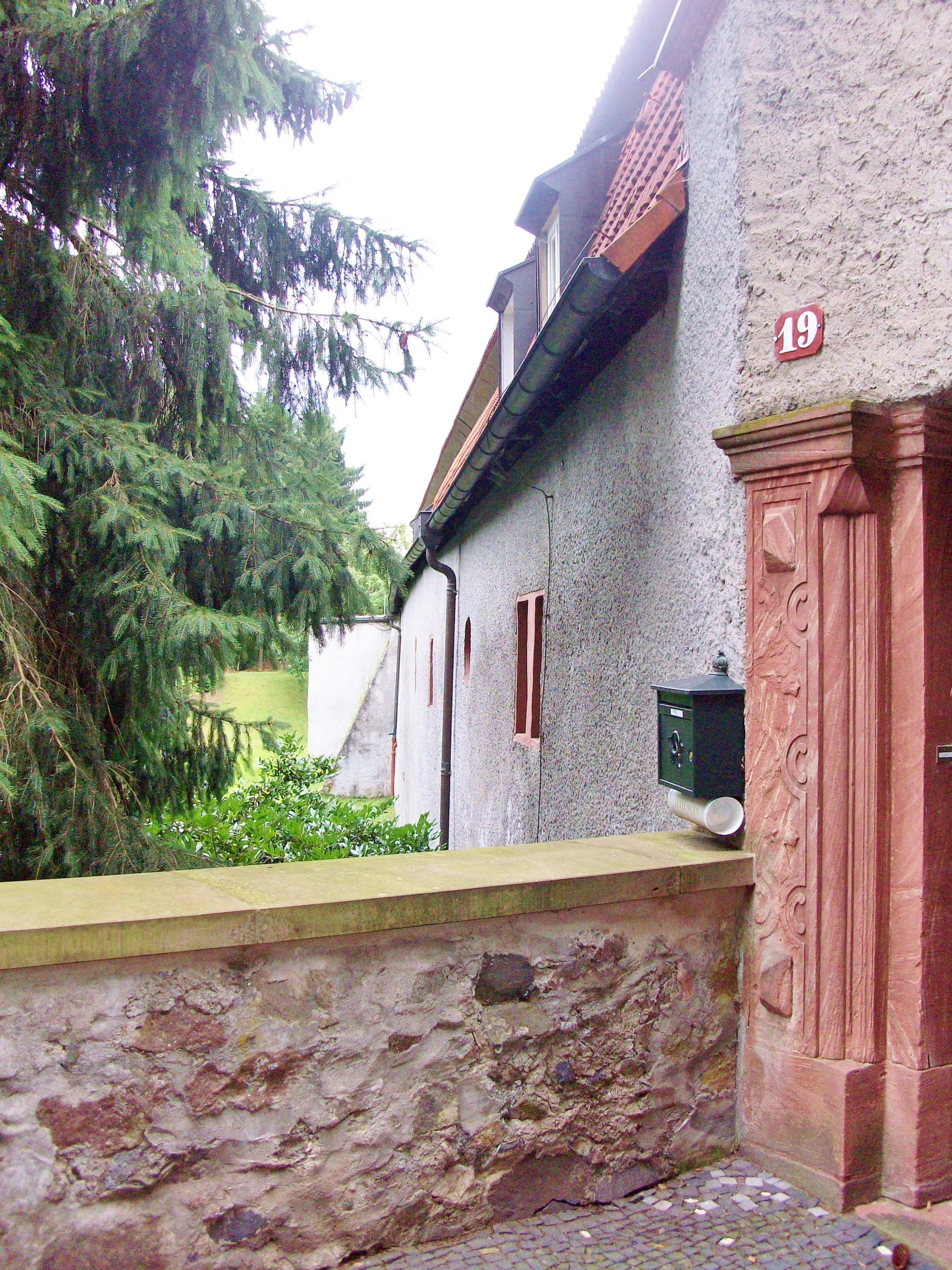 Blick entlang der Wehrmauer, an den die Wirtschaftsgebäude anlehnen, bis zum Rundturm. Wall und Graben sind sichtbar.